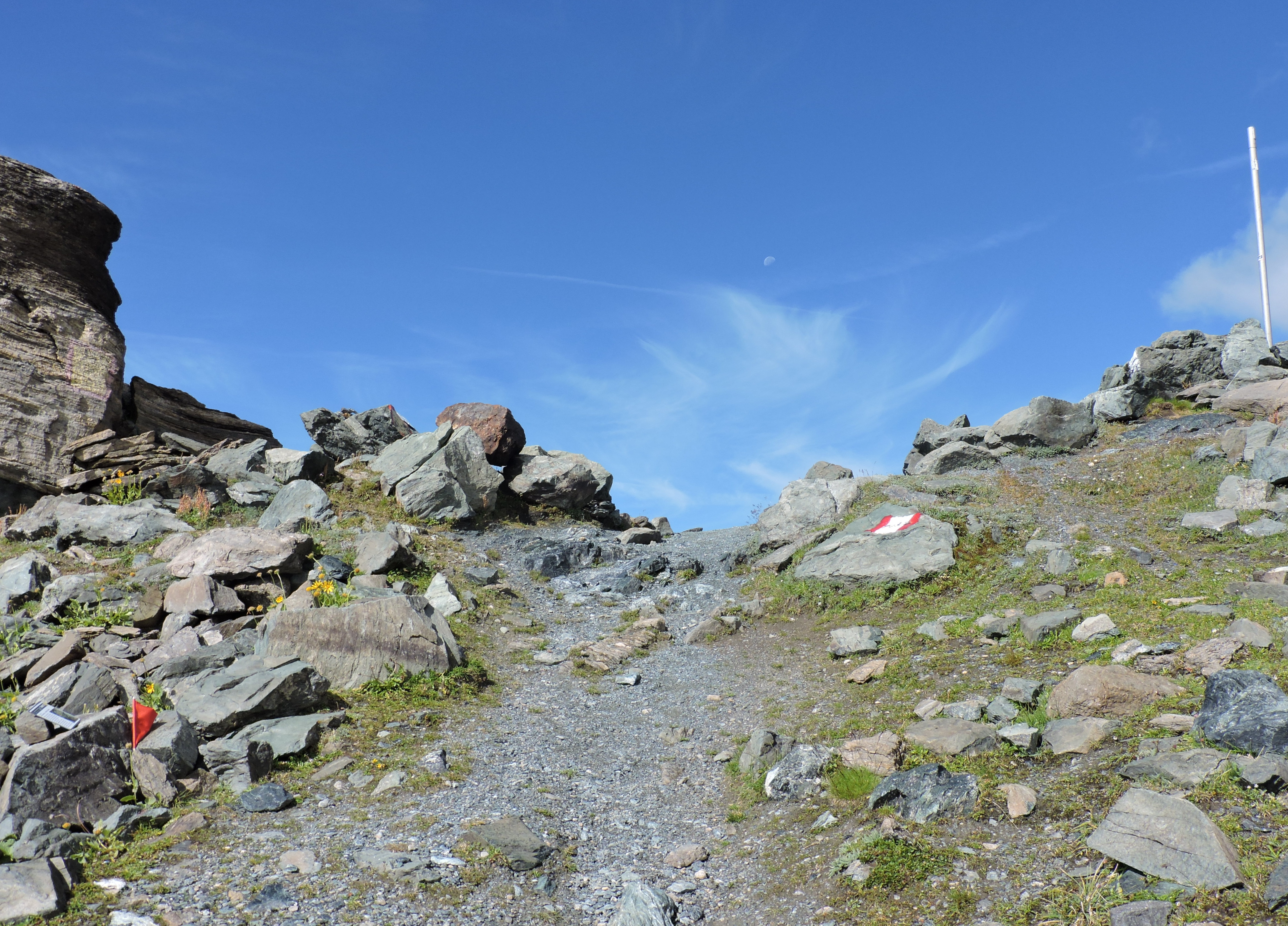 Col d'Olen, lato Valsesia